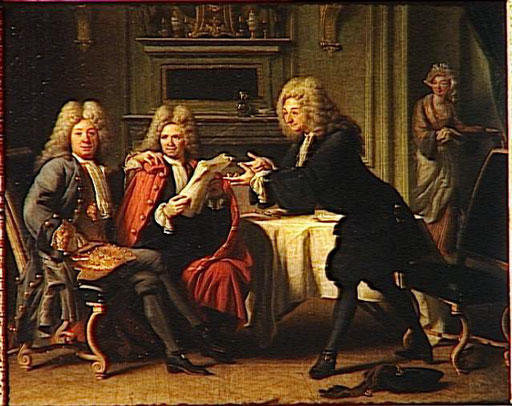 Bodin, Dufresny et Crébillon à la Maison d'Auteuil, h/t, 65x82 cm, Versailles